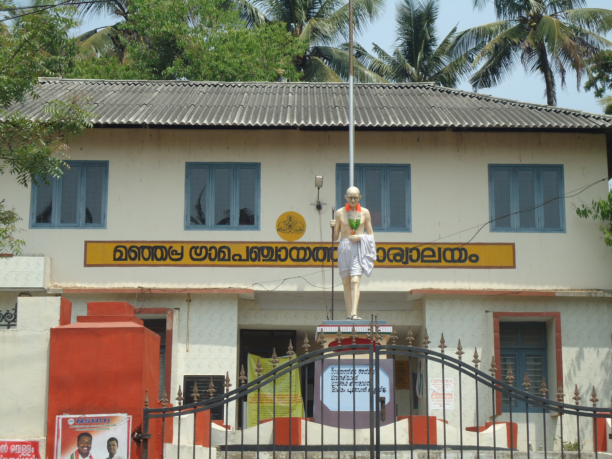 Manjapra Panchayat Office